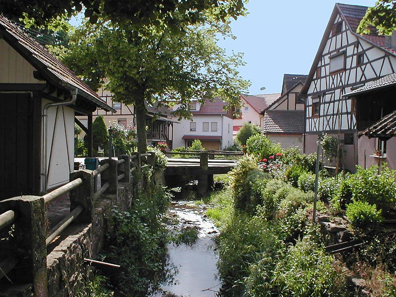 Ortsmitte von Neckargerach-Guttenbach am Krebsbach